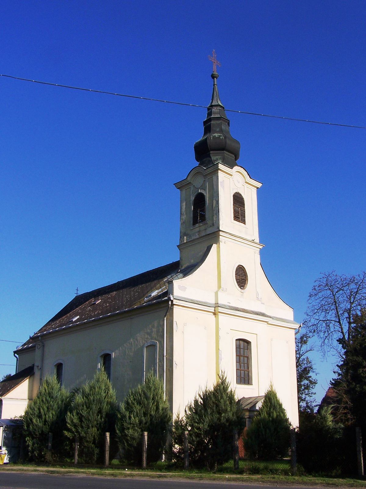 Római katolikus templom (Szentmártonkáta, Bajcsy-Zsilinszky u. 1.) This is a photo of a monument in Hungary. Identifier: 7406